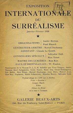 Affiche relative à l'Exposition internationale du surréalisme de la galerie des Beaux-Arts